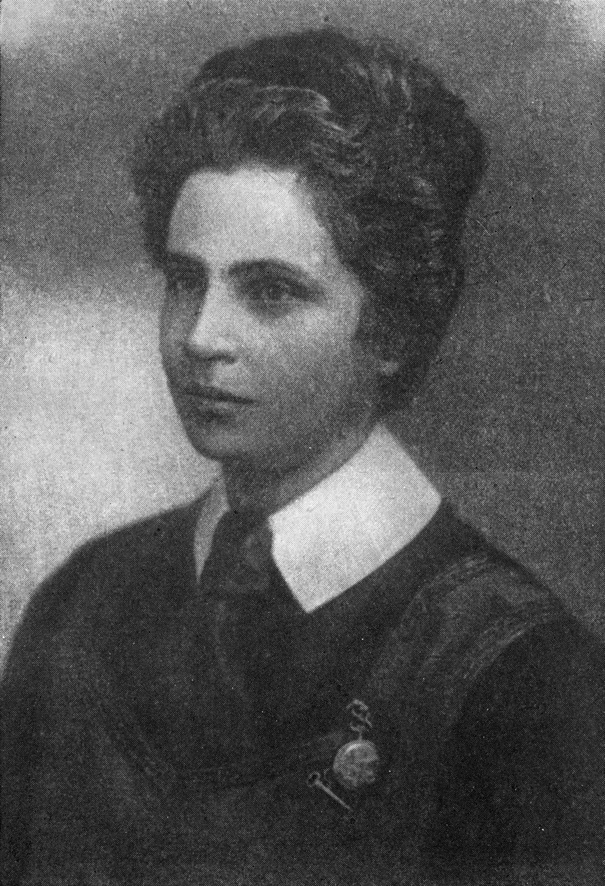 из книги: Райков Б.Е. Валериан Викторович Половцов. Его жизнь и труды. М. – Л.: Изд-во Академии наук СССР, 1956